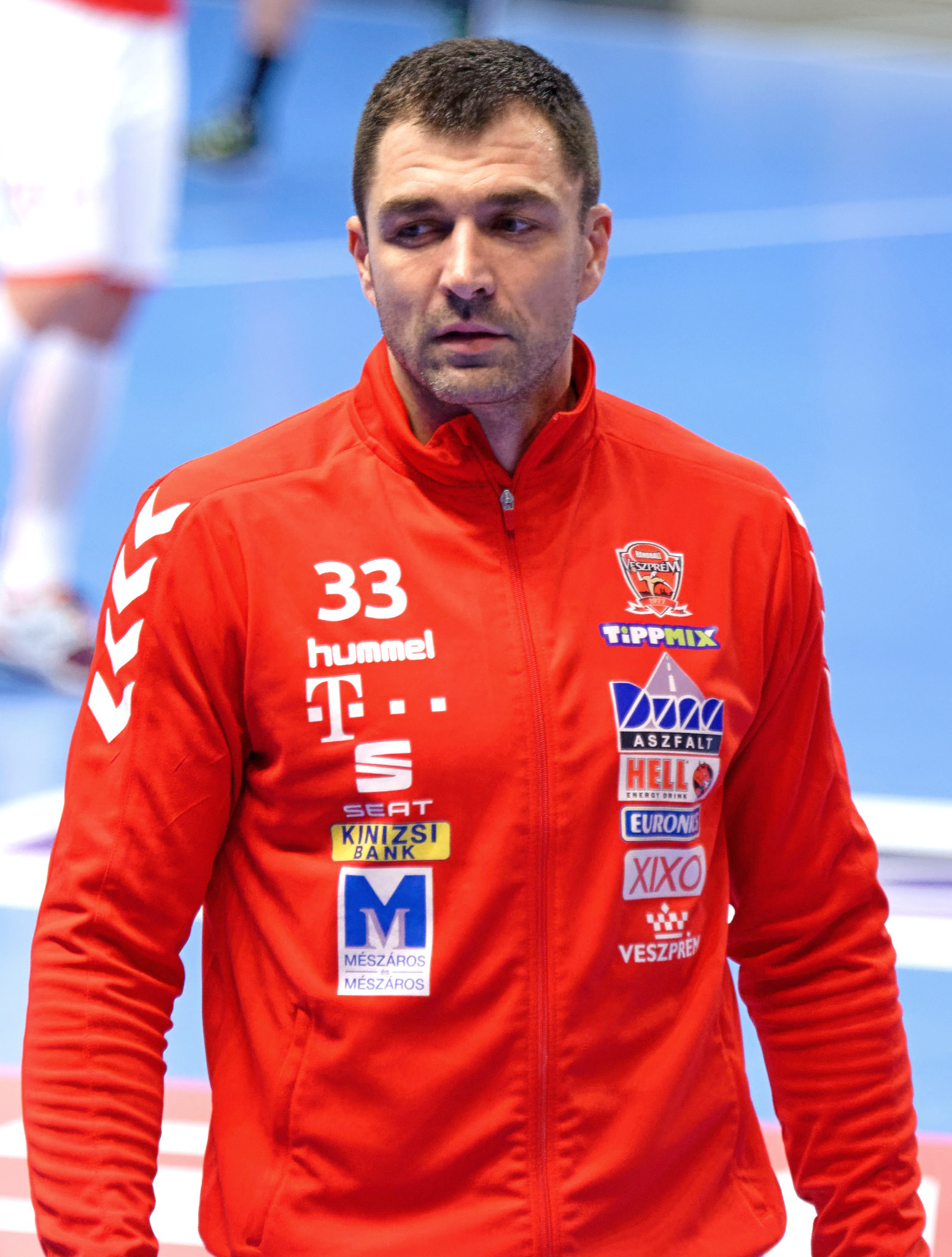 Rencontre de phase de groupe de la ligue des champions 2017/18 entre le PSG et Veszprem. A Coubertin, le 12 novembre 2017.